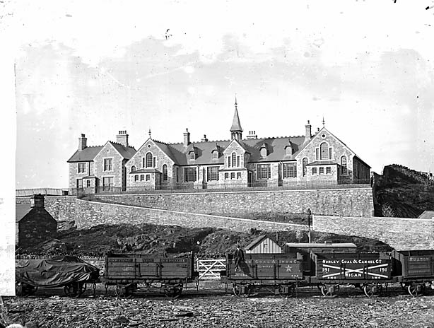 Teitl Cymraeg/Welsh title:Ysgol Glan-y-pwll, Blaenau Ffestiniog Ffotograffydd/Photographer: John Thomas (1838-1905) Dyddiad/Date: [ca. 1875] Cyfrwng/Medium: Negydd gwydr / Glass negative Maint/Dimensions: 16.5 x 21.5 cm. Cyfeiriad/Reference: jth00293 Rhif cofnod / Record no.: 3361244 Rhagor o wybodaeth am gasgliad John Thomas yn Llyfrgell Genedlaethol Cymru More information about the John Thomas Collection at the National Library of Wales Mae ffotograffau John Thomas hefyd yn rhan o Broject Europeana Libraries John Thomas' photographs also form part of the Europeana Libraries Project